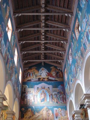 Interno della Cattedrale di San Demetrio Megalomartire